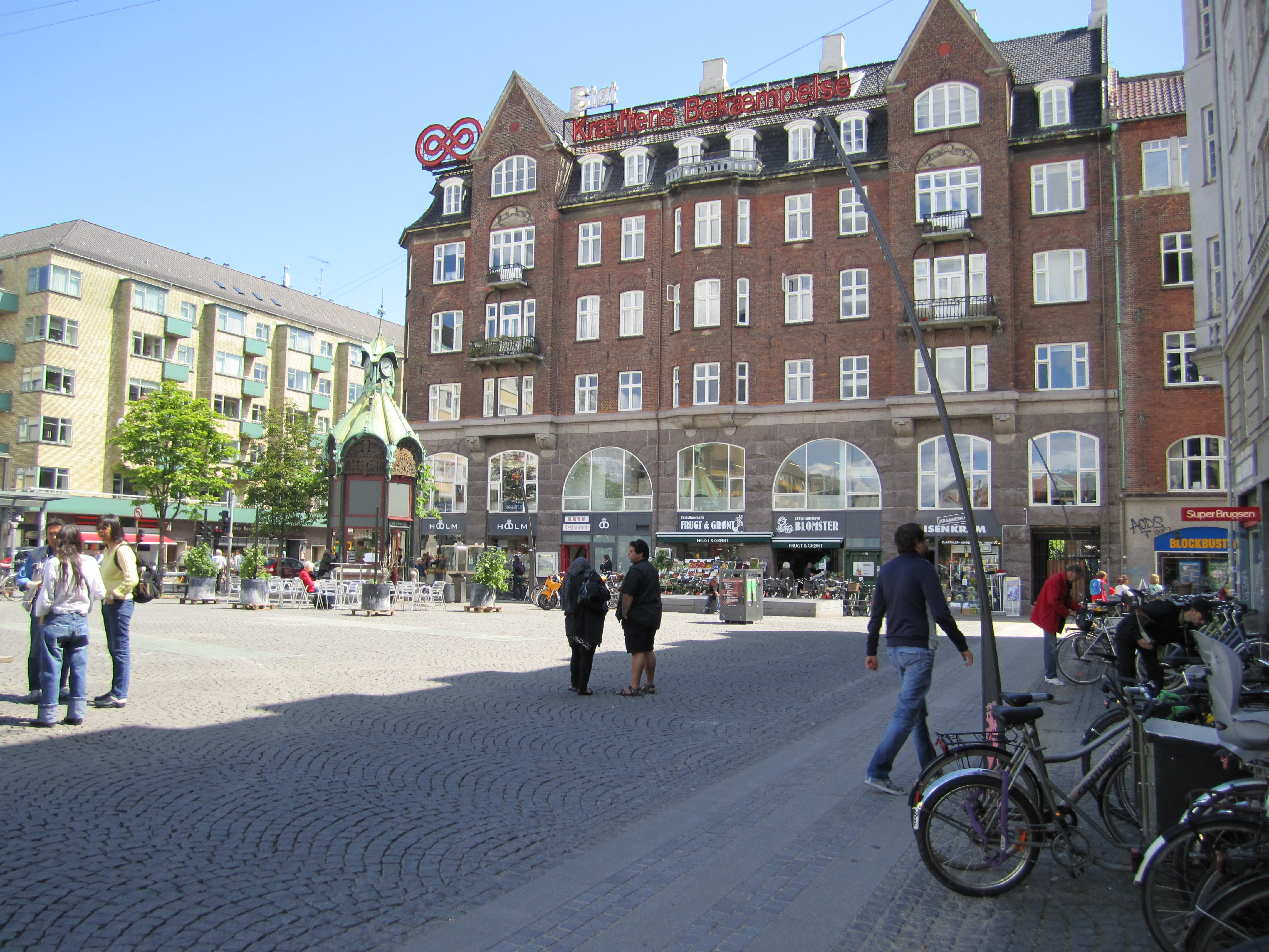 Christianshavns Torv in Copenhagen, Denmark